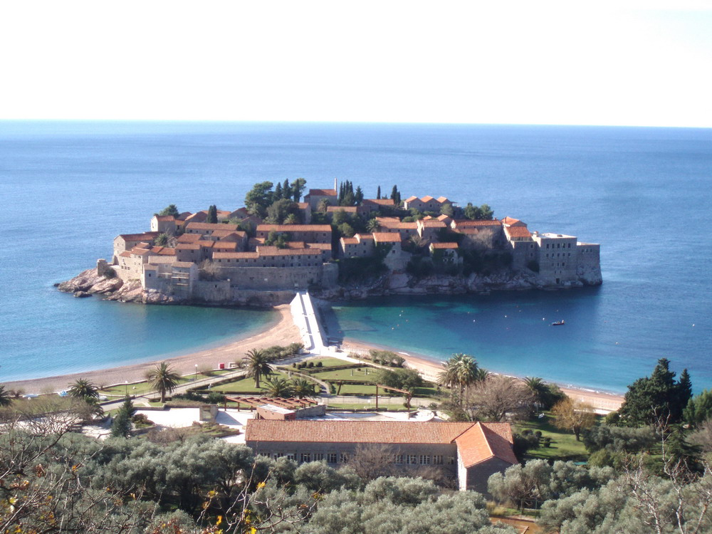 St. Stefan ( 2 beaches).